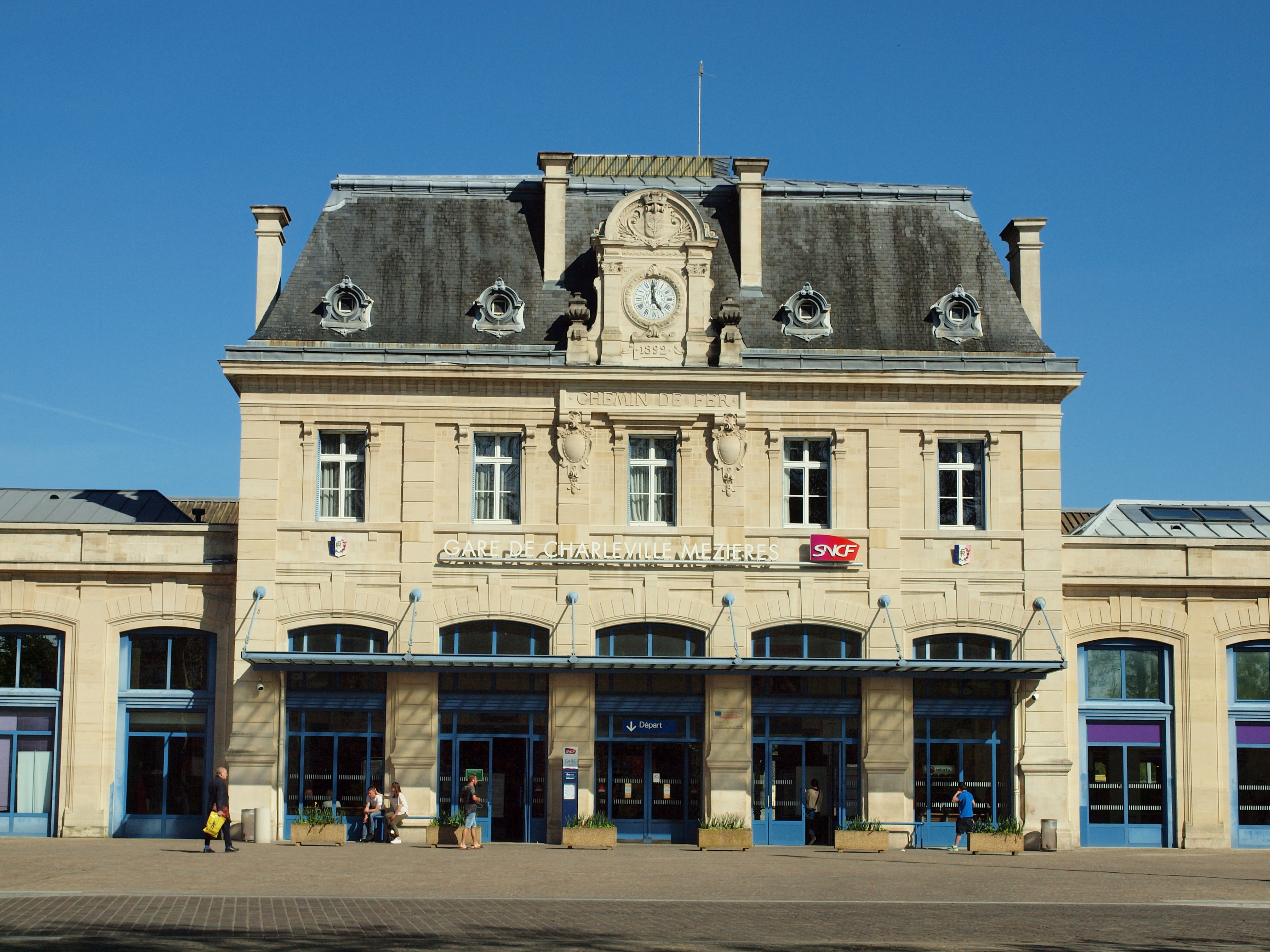 Gare de Charleville-Mézières (Ardennes, France)